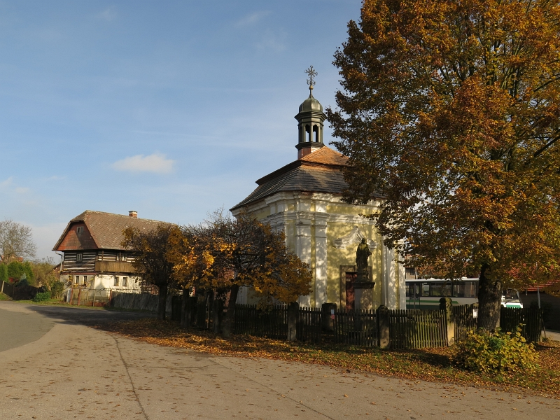 Kaple svatých Petra a Pavla, Příchvoj.